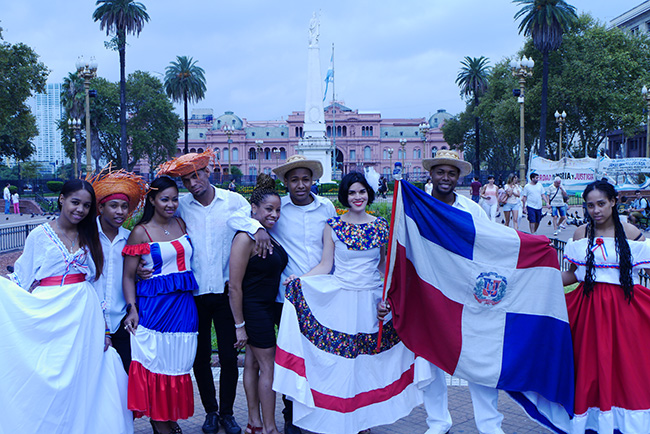 Cuerpo de Baile Folklórico de la Embajada de la República Dominicana en Buenos Aires, Argentina, en la ocasión de la Elección de la Reina Porteña de las Colectividades realiza en la Plaza de Mayo.